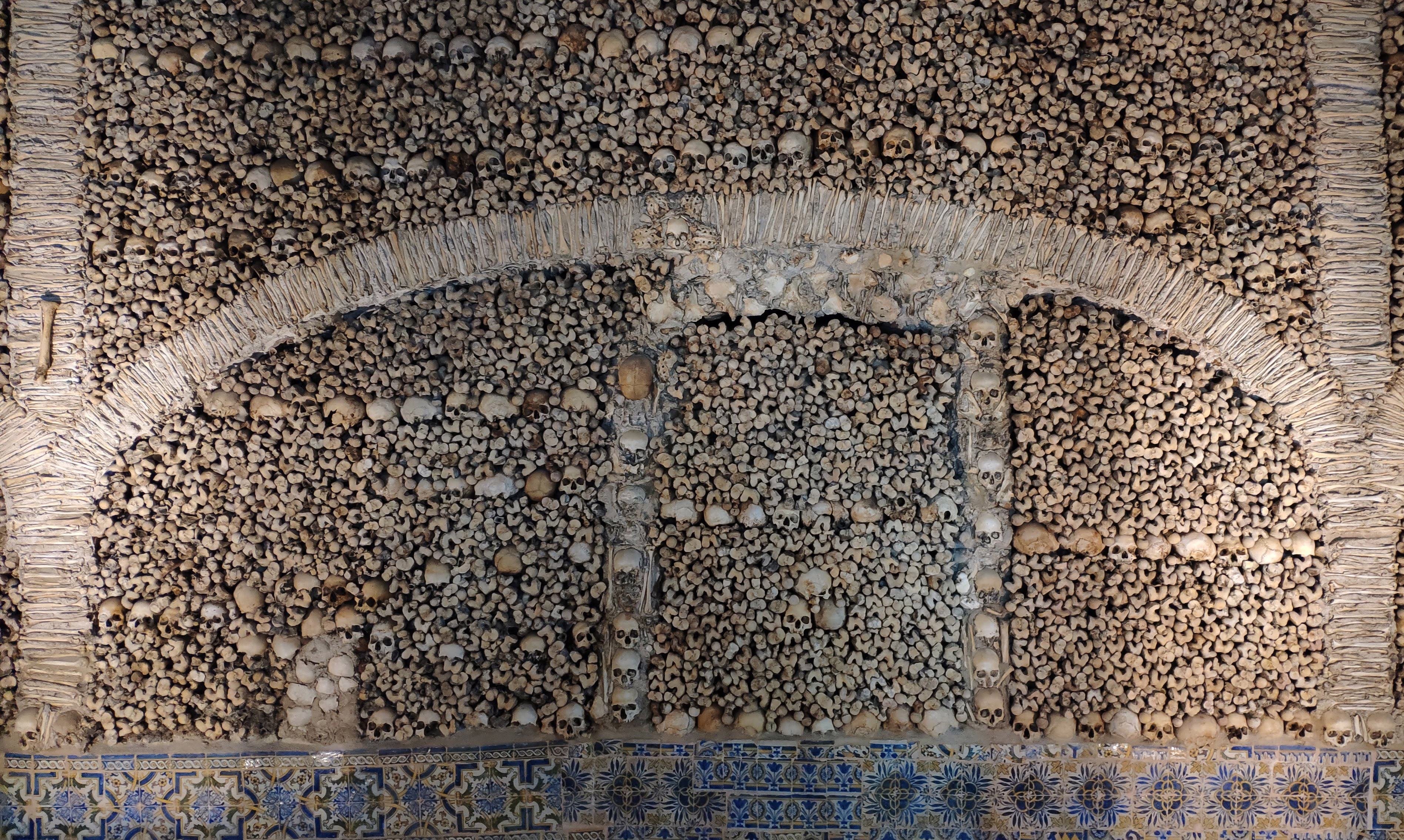 Muro de la capilla de los huesos, Évora, Portugal